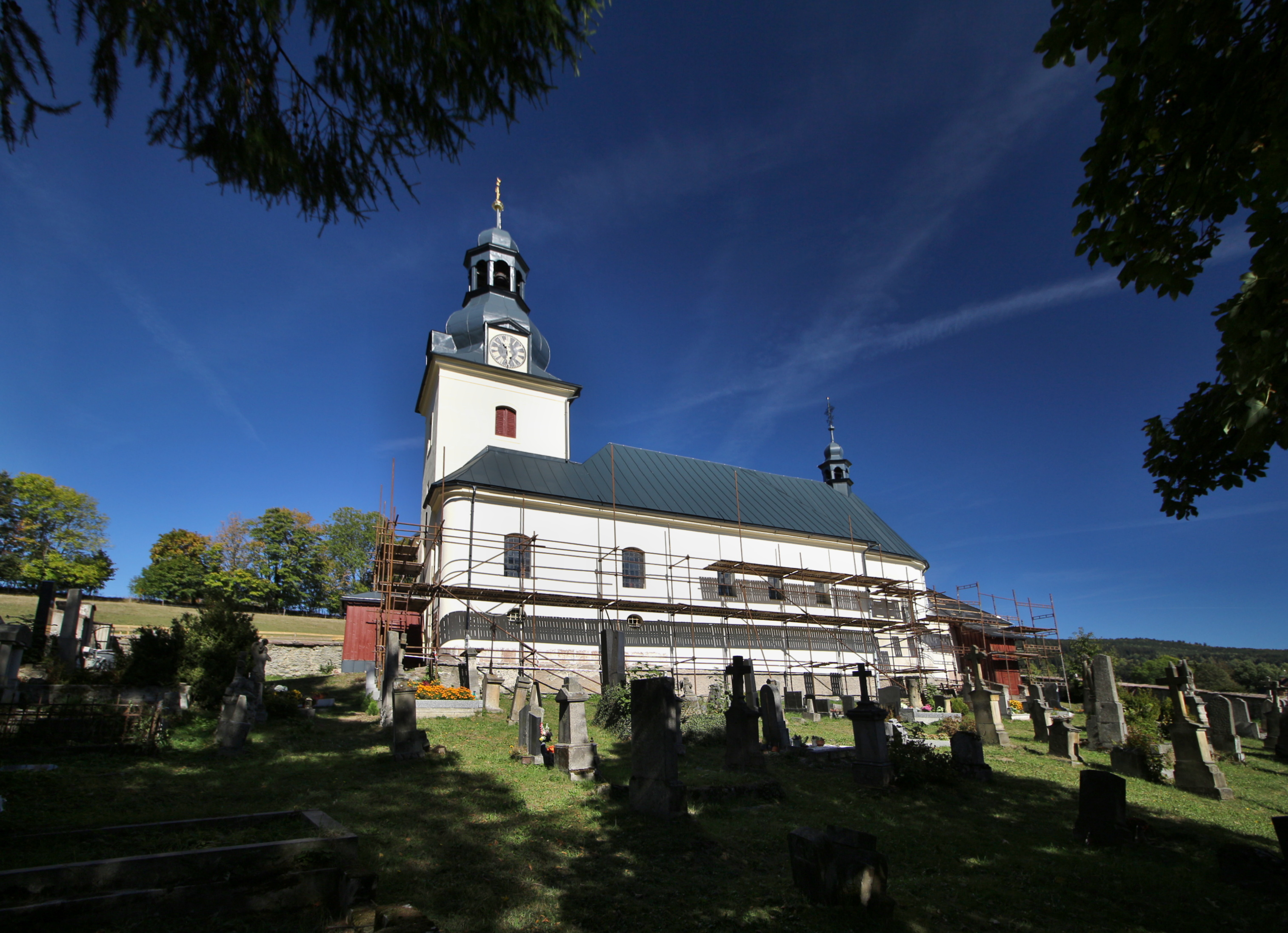 Kostel svatých Petra a Pavla ve Vítkovicích v Krkonoších